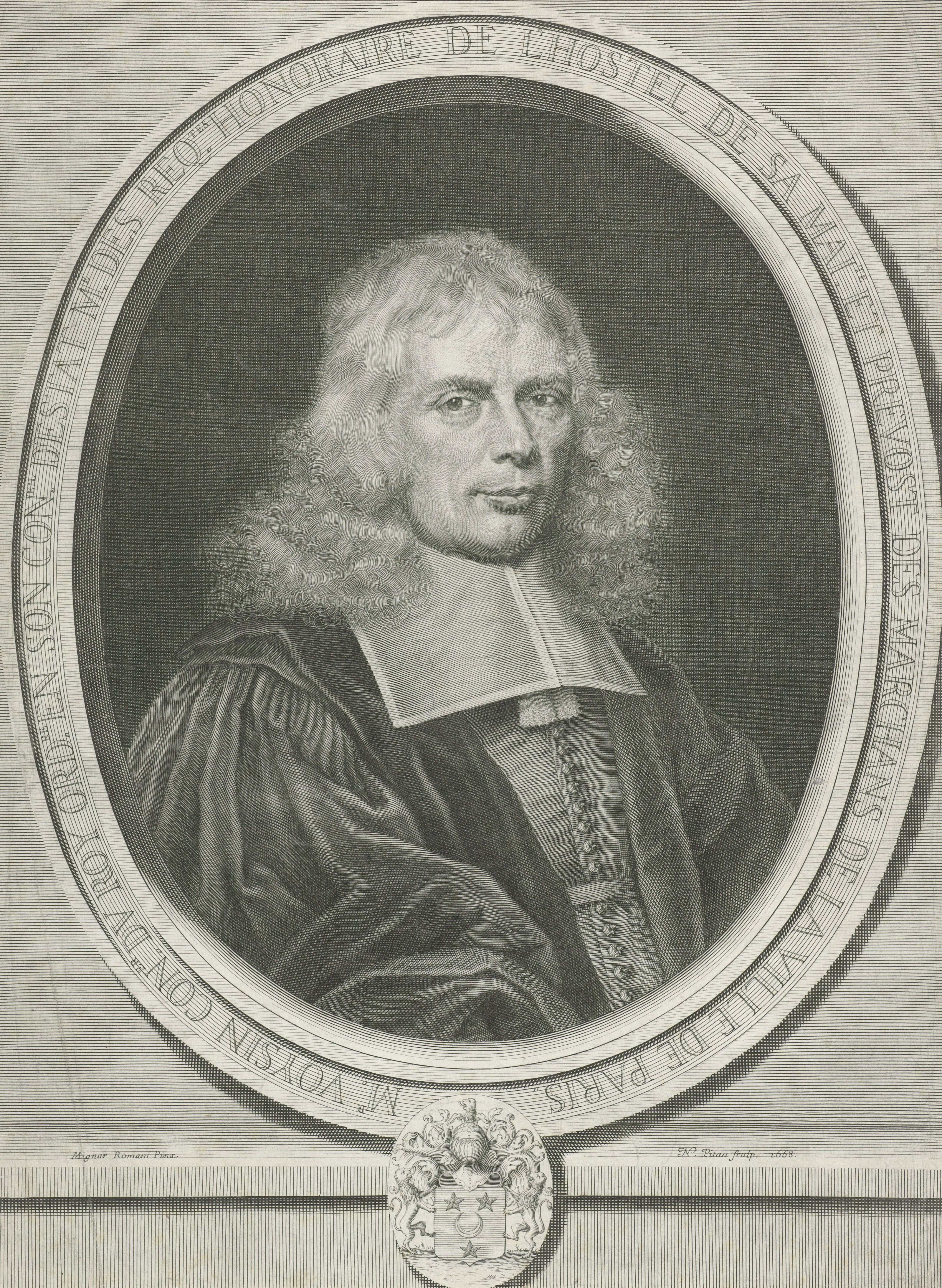 IdentificatieTitel(s): Portret van Daniel François Voysin de La NoirayeObjecttype: prent Objectnummer: RP-P-1948-44Catalogusreferentie: Wurzbach 54Opschriften / Merken: verzamelaarsmerk, verso midden onder, gestempeld: Lugt 2228VervaardigingVervaardiger: prentmaker: Nicolas Pitau (I) (vermeld op object)naar schilderij van: Pierre Mignard (1612-1695) (vermeld op object)Plaats vervaardiging: ParijsDatering: 1668Fysieke kenmerken: gravureMateriaal: papier Techniek: graveren (drukprocedé)Afmetingen: blad: h 450 mm × b 328 mmOnderwerpWat: armorial bearing, heraldryWie: Daniel François Voysin de La NoirayeVerwerving en rechtenVerwerving: aankoop 1948Copyright: Publiek domein